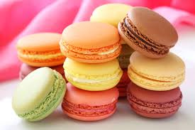 Macarons de diferents colors i gustos.